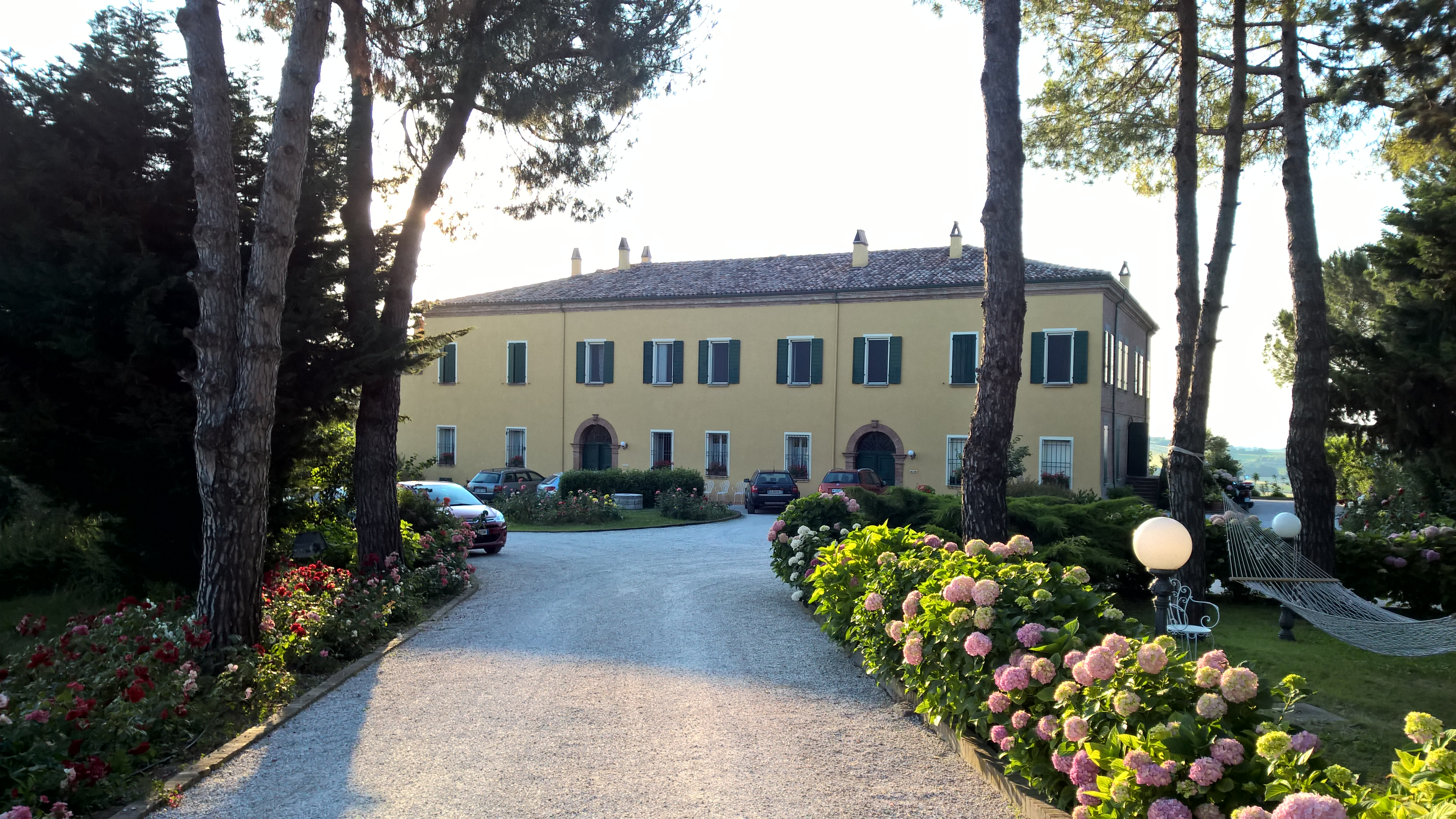 Palazzo Astolfi (Poggio Torriana, Italia). Vista della facciata principale e del vialetto di ingresso